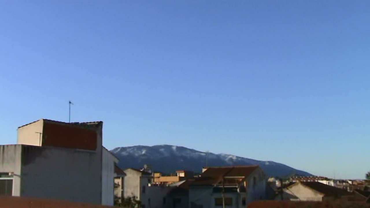 vista de la sierra de carrascoy nevada desde sangonera la verde